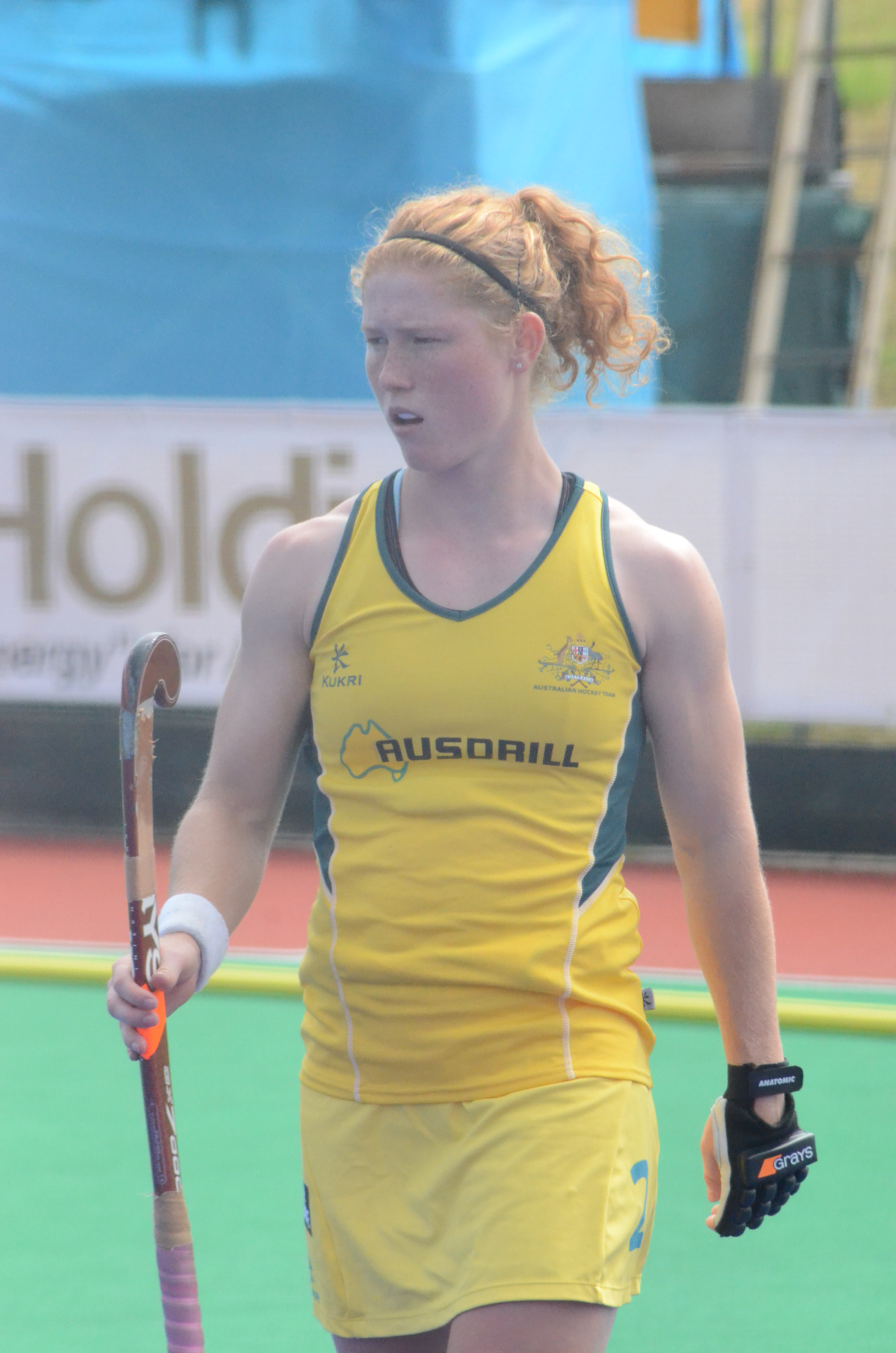 Georgia Nanscawen